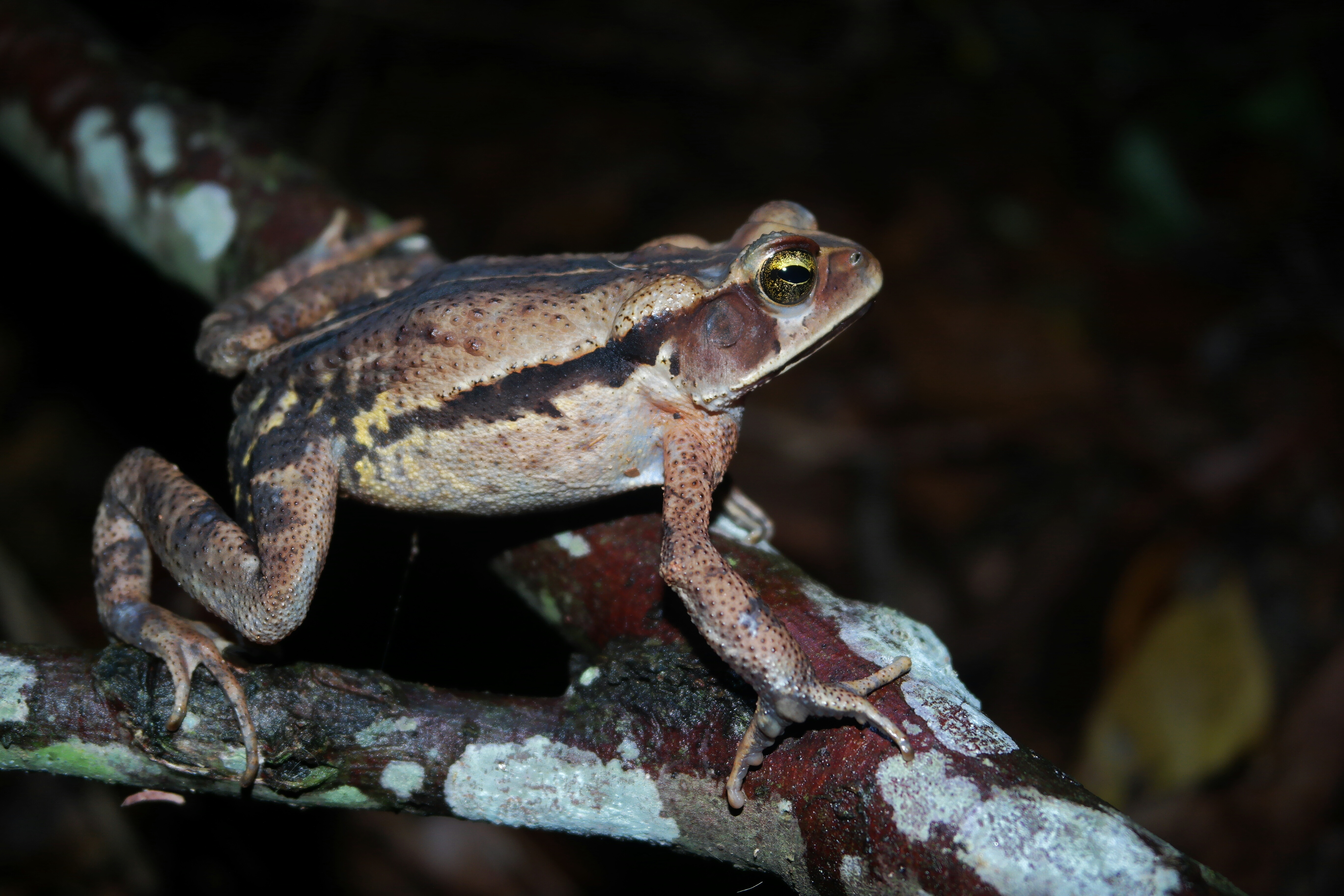 Fotografado na Mata do Paraíso, Viçosa, Minas Gerais